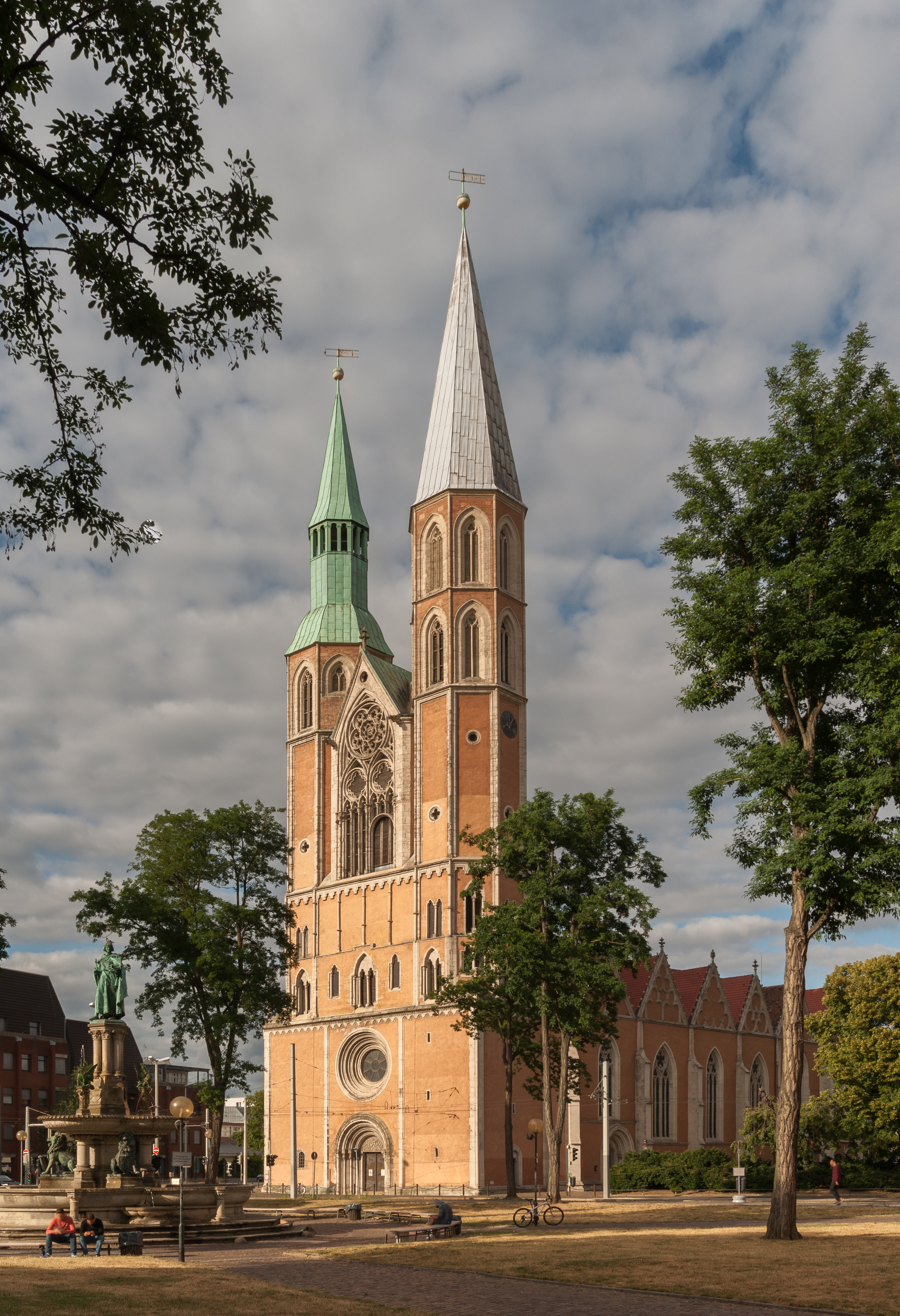 Katharinenkirche vom Hagenmarkt gesehen, links der Heinrichsbrunnen. Braunschweig, Niedersachsen.